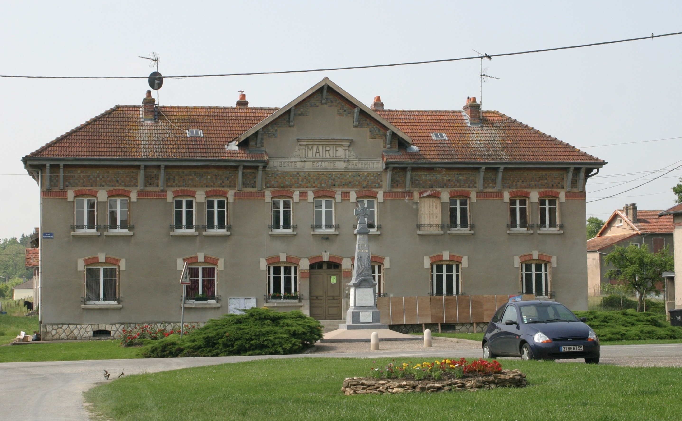 D'Gemeng vu Forges.